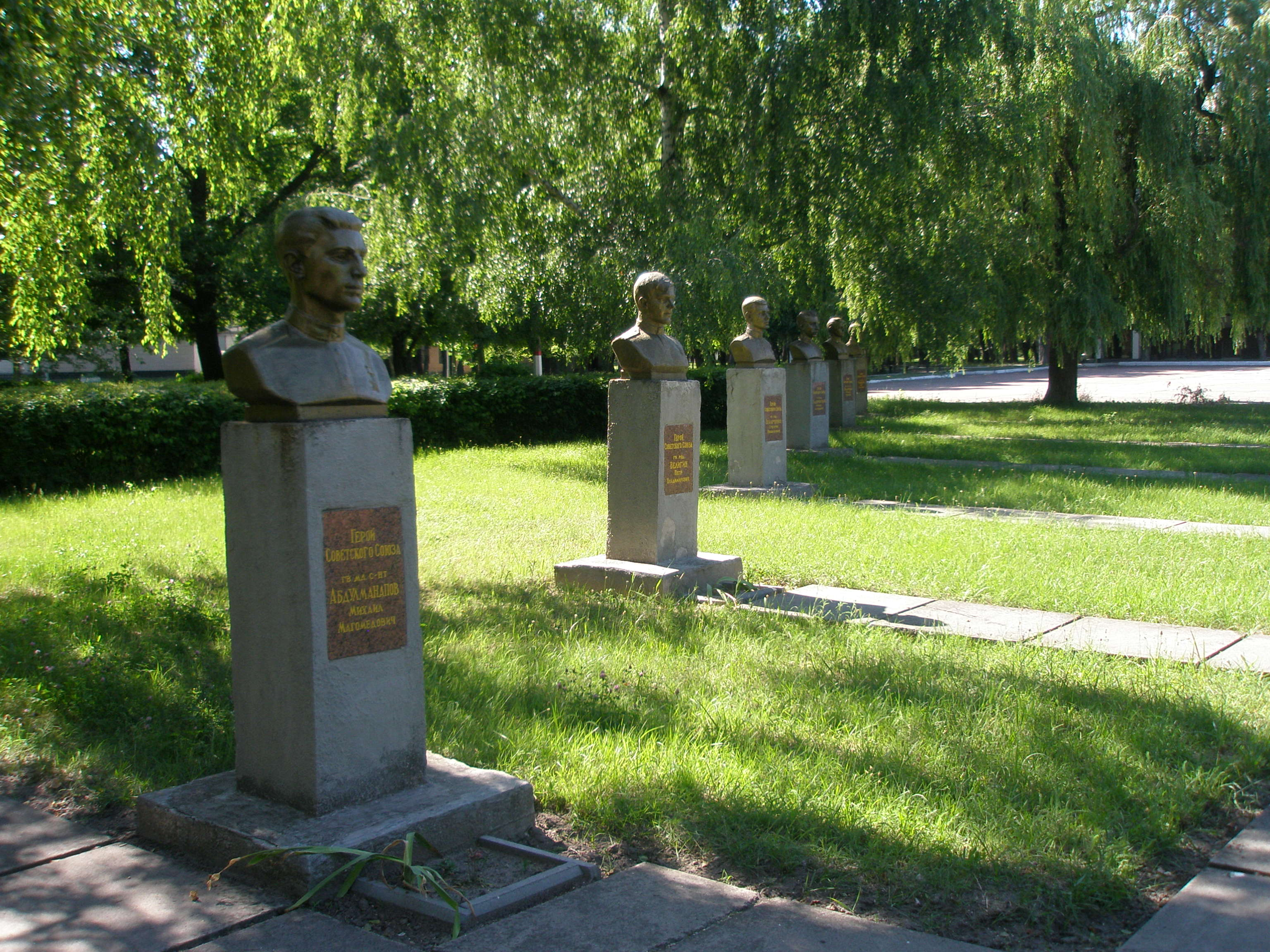 Аллея 6 саперов отделения ст. сержанта Поддубного Н.И., Героев Советского Союза. Создана в 1984 году на территории воинской части - наследницы, части в которой воевали Герои. Бюсты созданы коллективом студентов архитектурного факультета Киевского инженерно-строительного института.